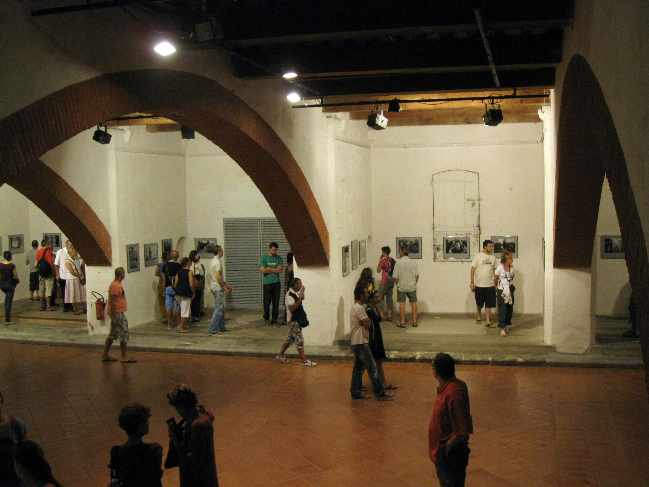 Convent dels Mínims (Perpinyà), el pis inferior de l'església, amb les antigues capelles, durant la celebració del certamen de fotoperiodisme Visa pour l'Image .